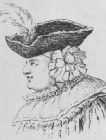 François Le Noir, sieur de La Thorillière, est un comédien français né à Paris en 1626 et mort à Paris le 27 juillet 1680.